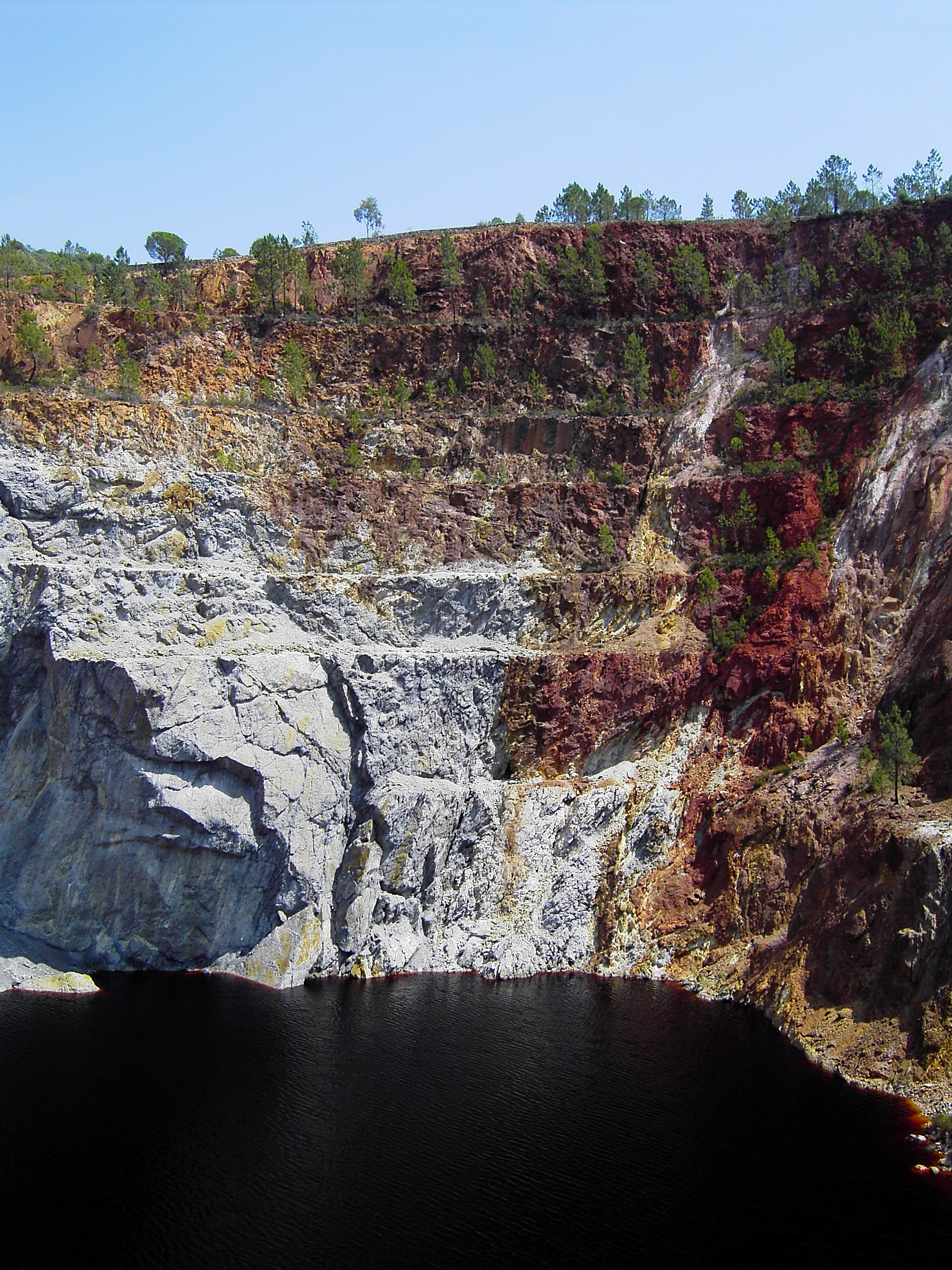 Corta de Mina de Peña del Hierro, en Nerva (Huelva)